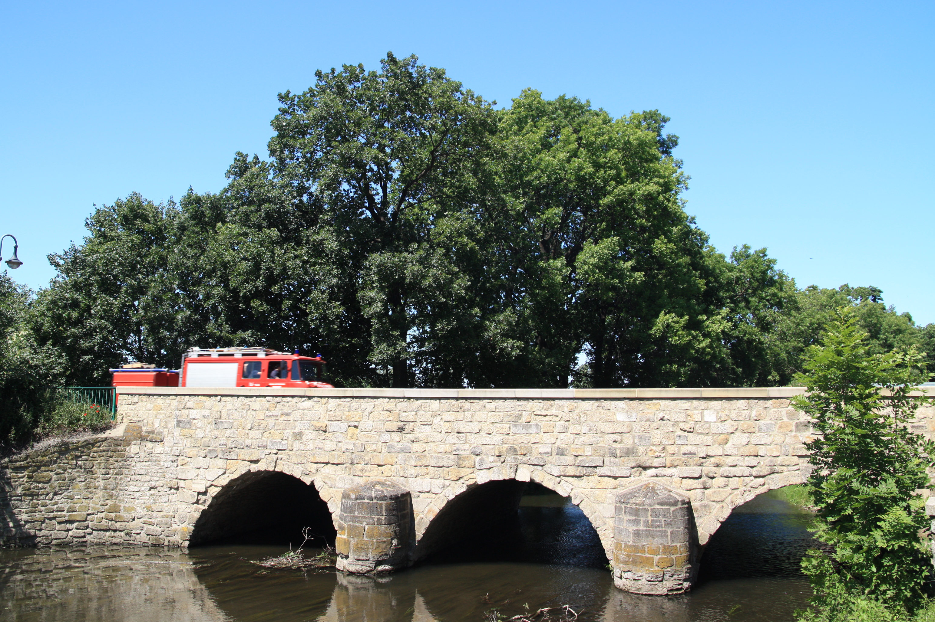 Die 2008 sanierte Mühlgrabenbrücke wurde bereits vor dem 30-jährigen Krieg gebaut